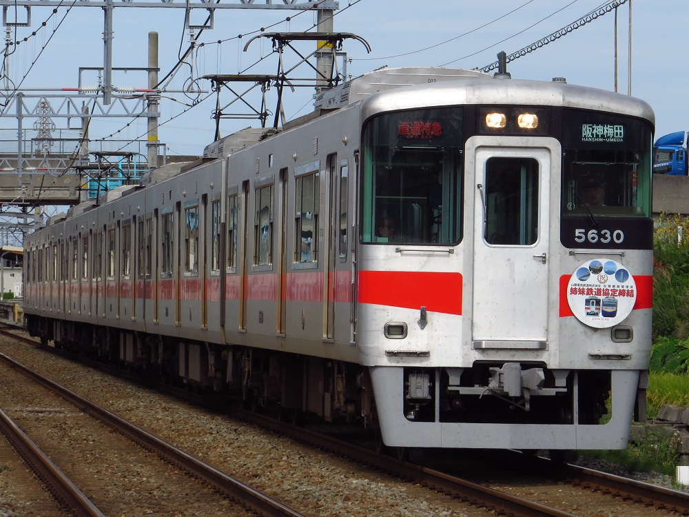 東二見～西二見にて撮影